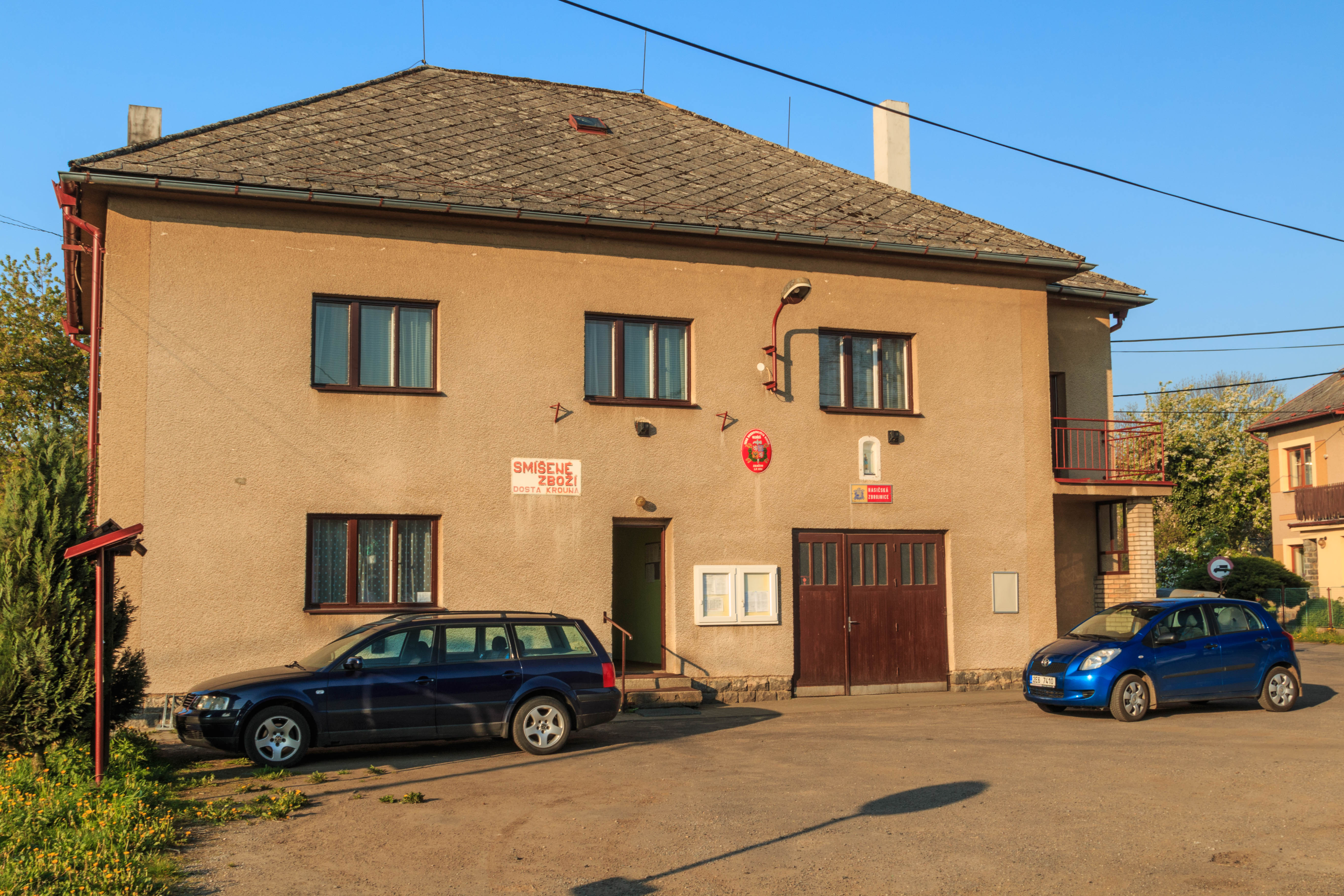 Oldřiš prodejna